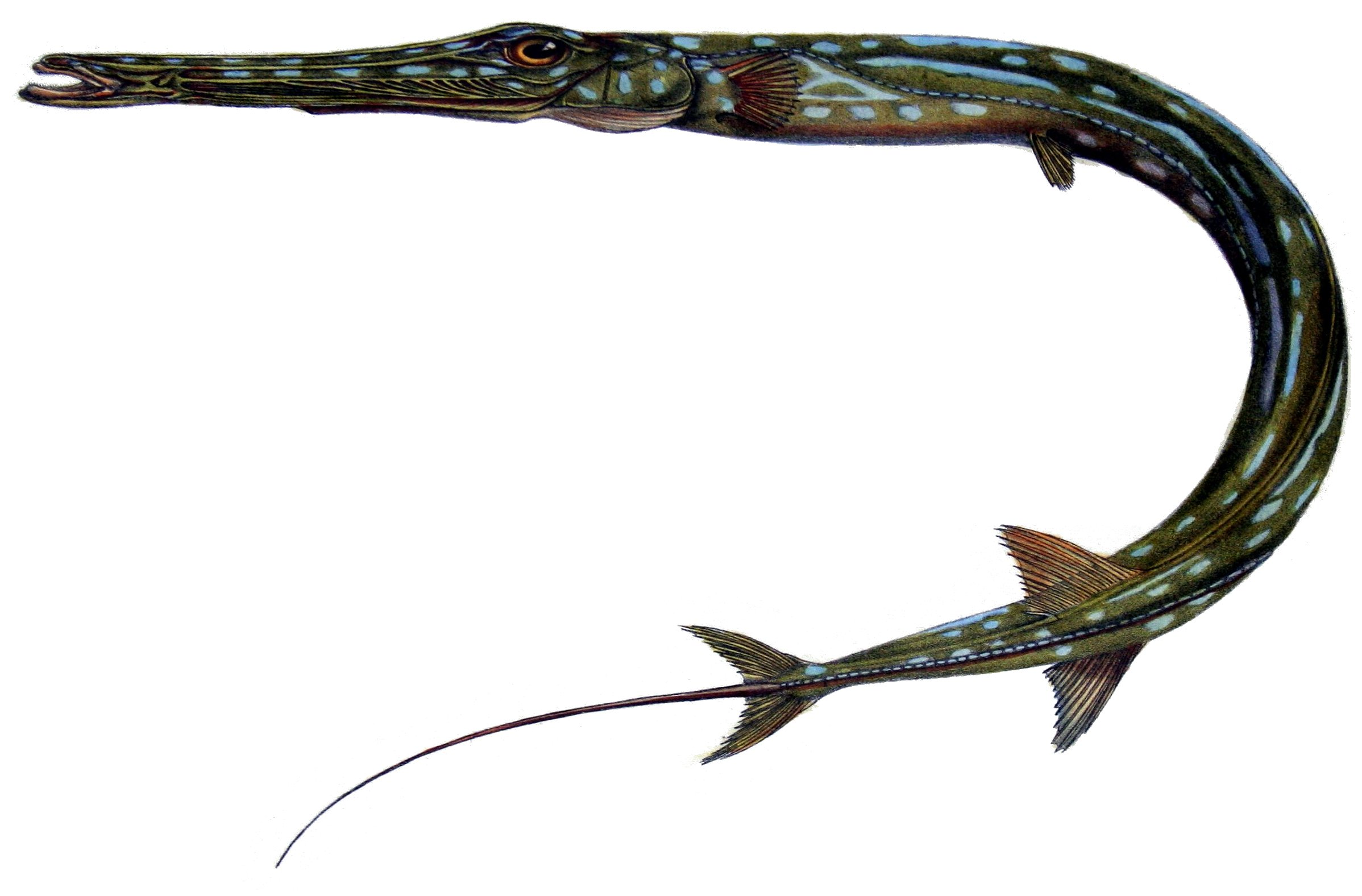 Aulastoma margravii Cast. = Fistularia tabacaria Linnaeus, 1758